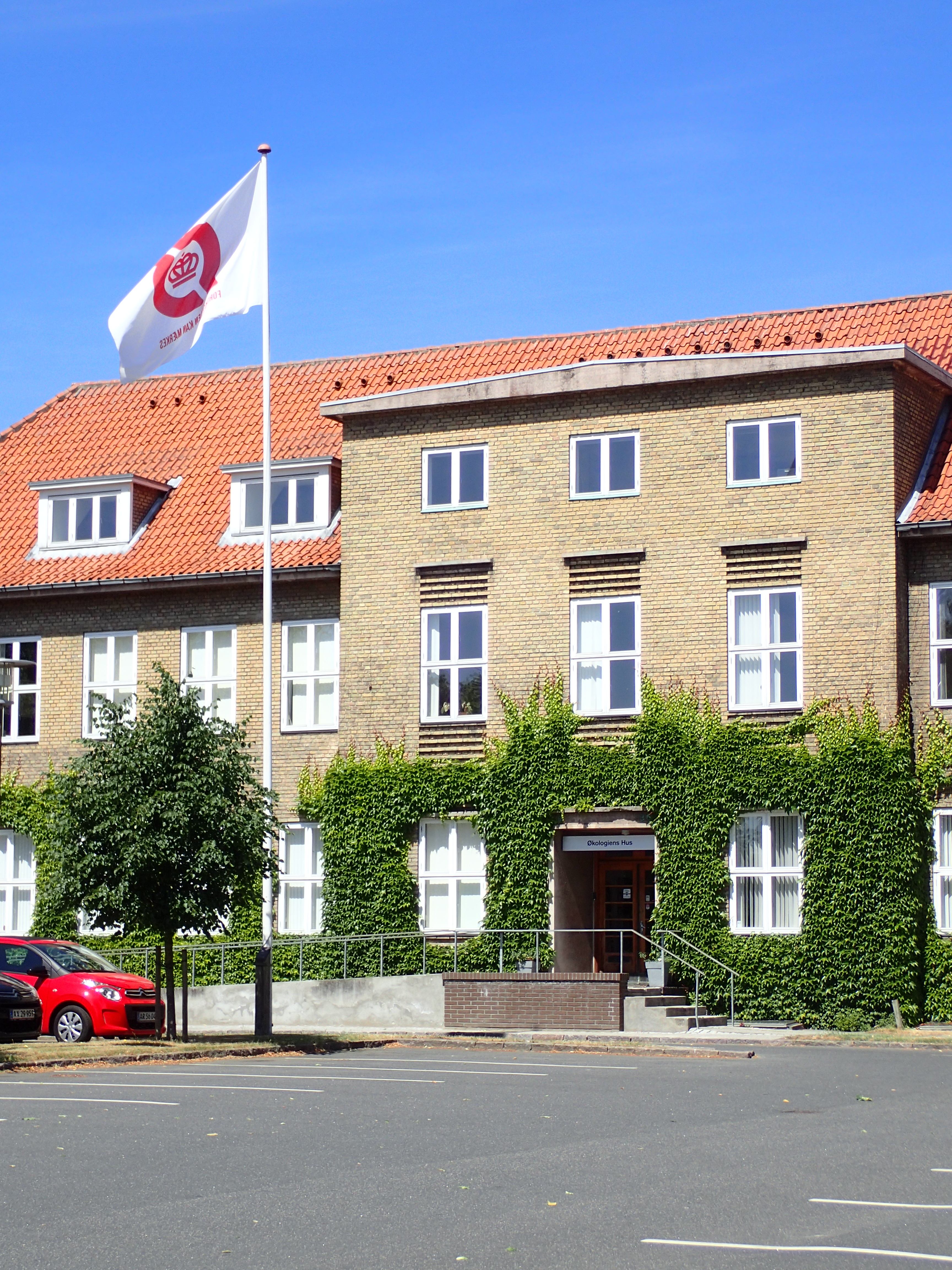 Økologiens Hus i Åbyhøj.